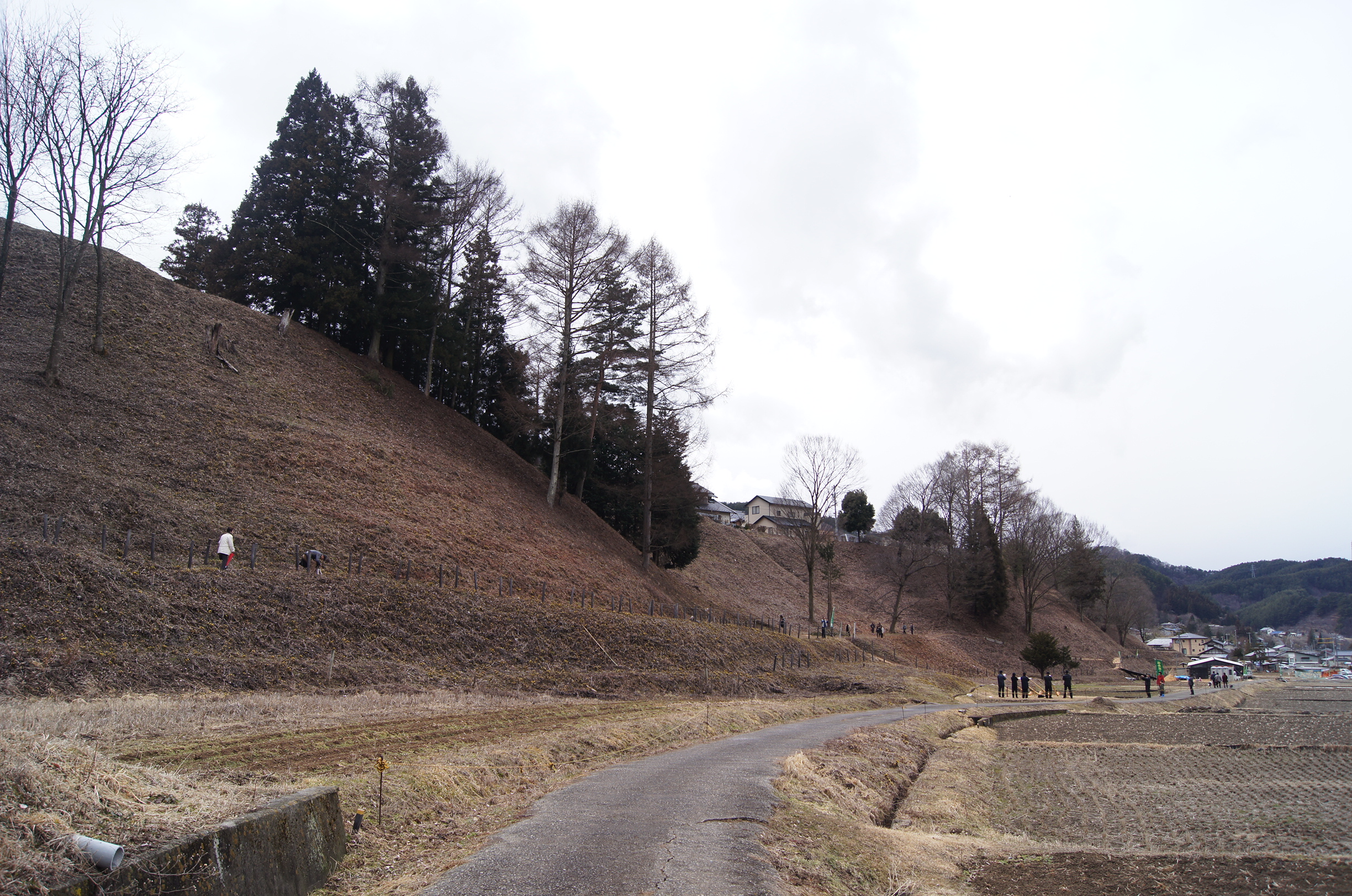 長野県松本市四賀の赤怒田福寿草公園の崖の様子。この崖の斜面に福寿草数十万株が育つ。河岸段丘の崖である。